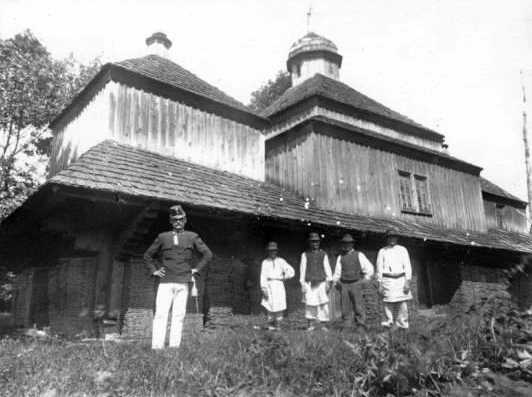 Church_of_St._Paraskeva._Skole.1914-1918